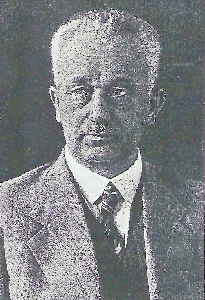 Porträtfotografie von Dr. med. Hermann Bräuning (1880–1946)